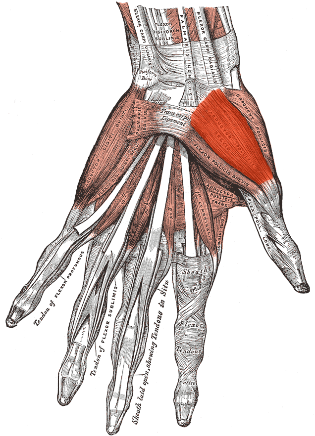 Musculus abductor pollicis brevis